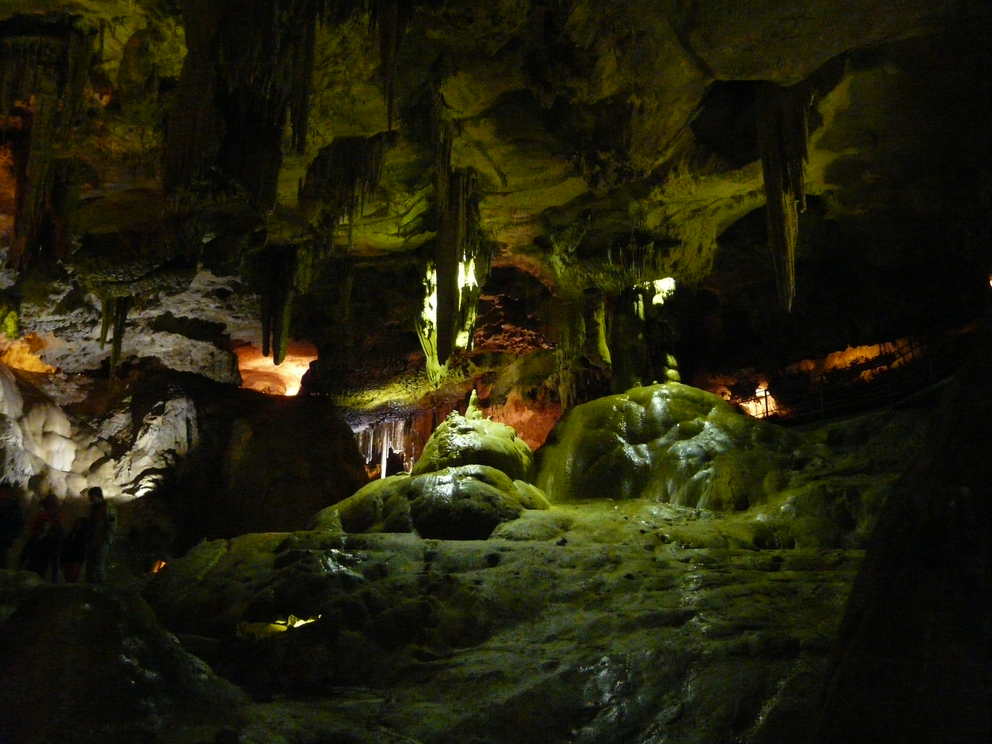 L'intérieur des grottes de Bétharram.